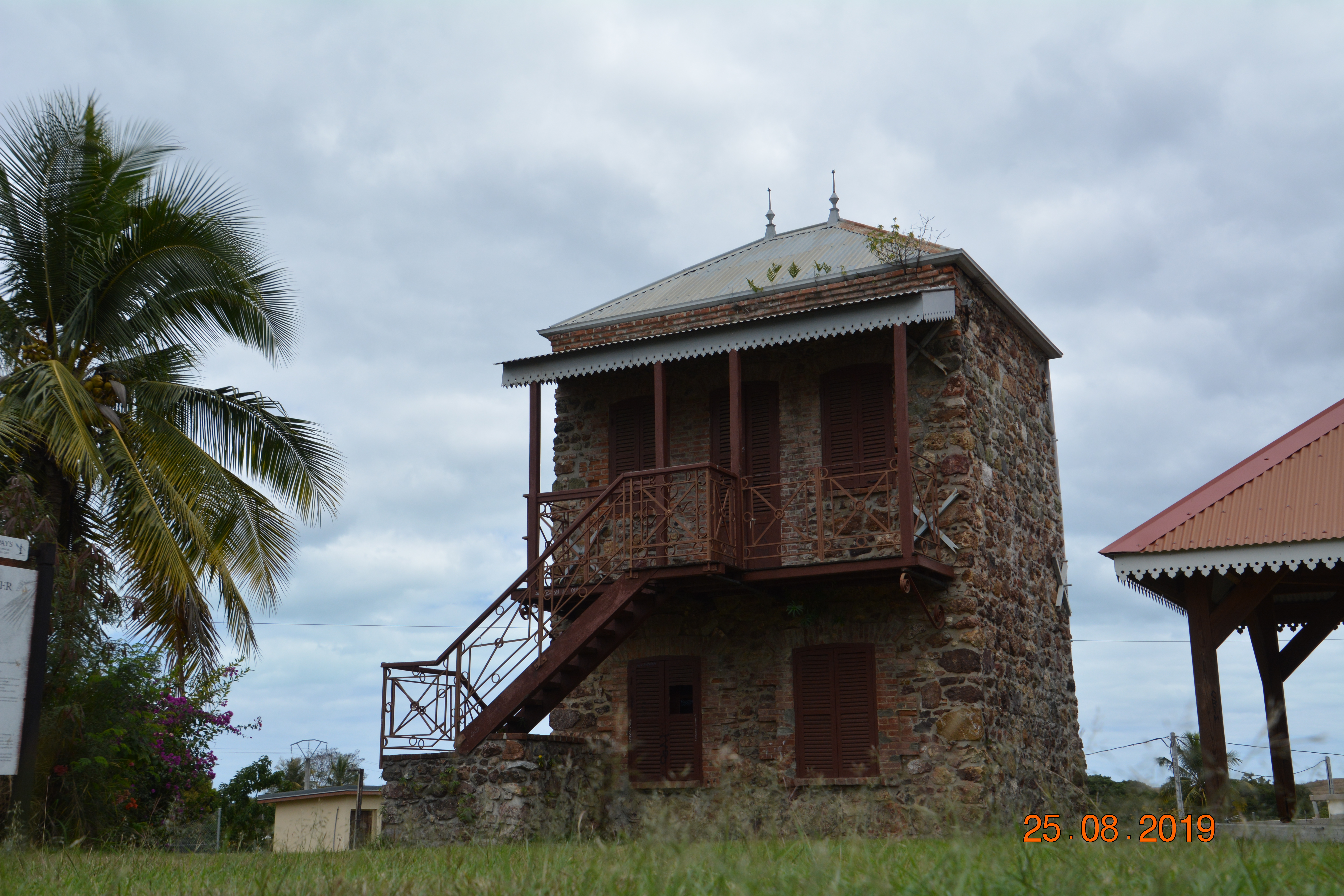 pouembout heritage the dovecote